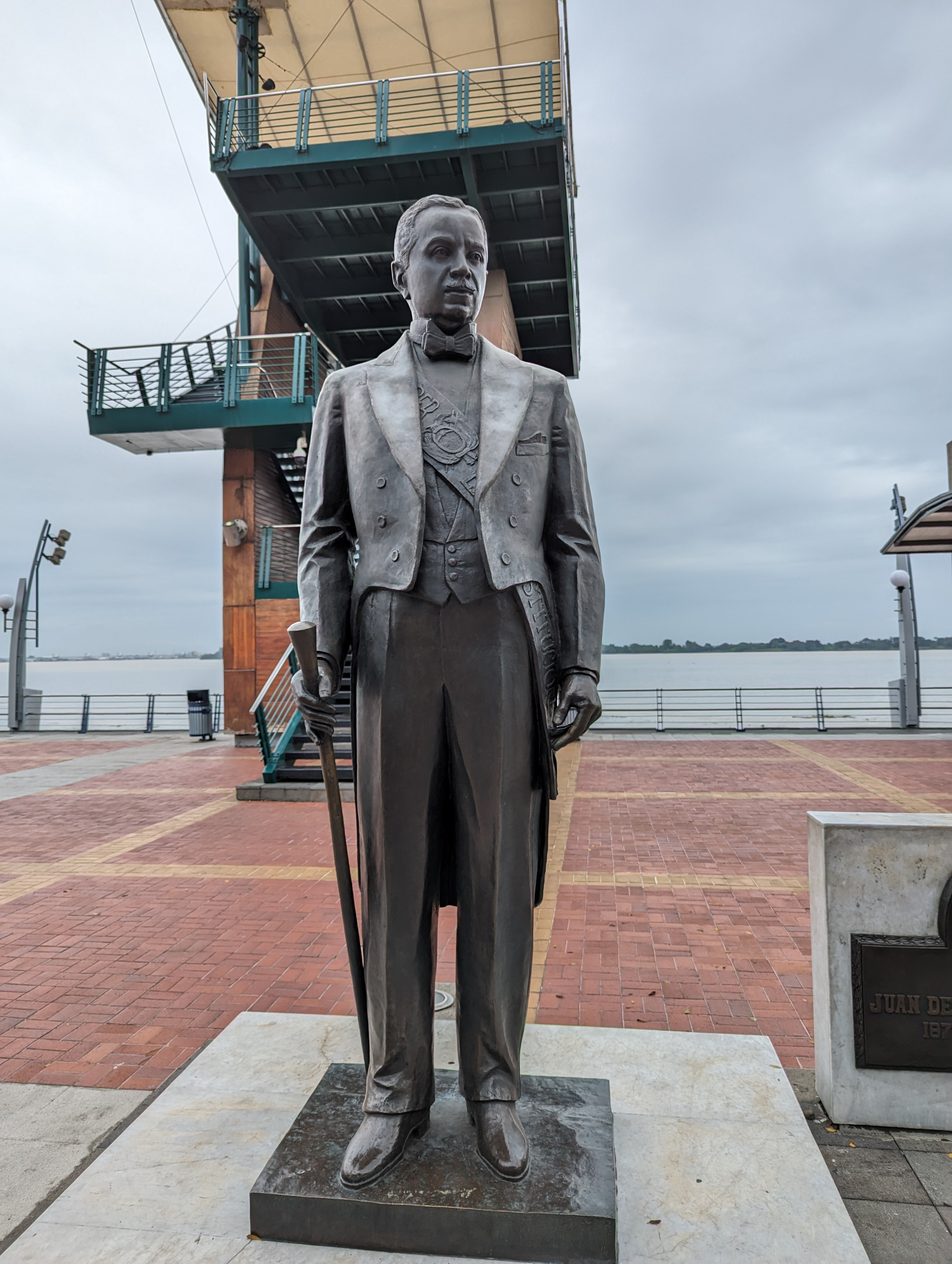 Monumento de Juan de Dios Martínez en el Malecon 2000.